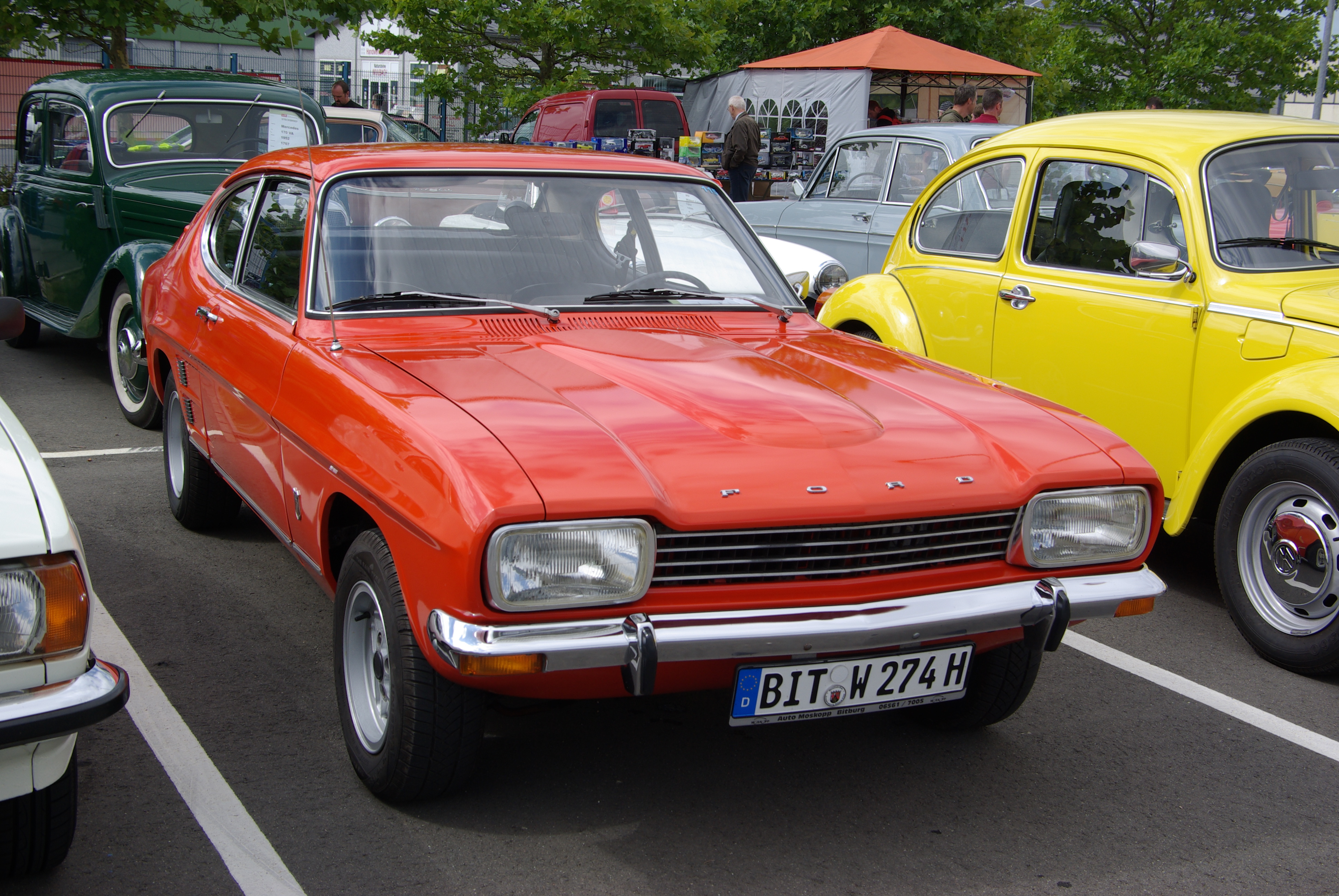 Ford Capri, Baujahr 1973, 1600 cm³, 4 Zyl., 100 PS, Bitburg Classic 2012